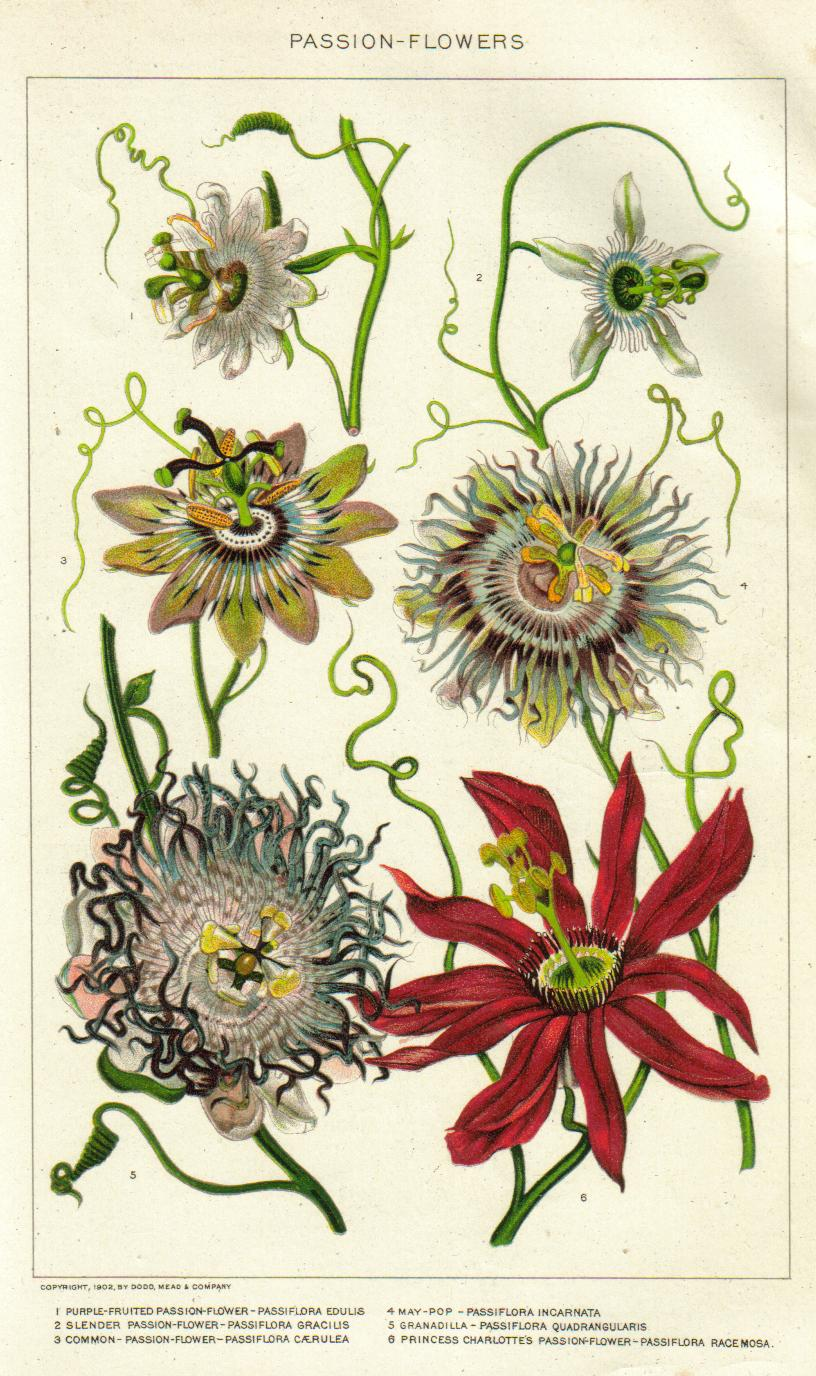 Painting